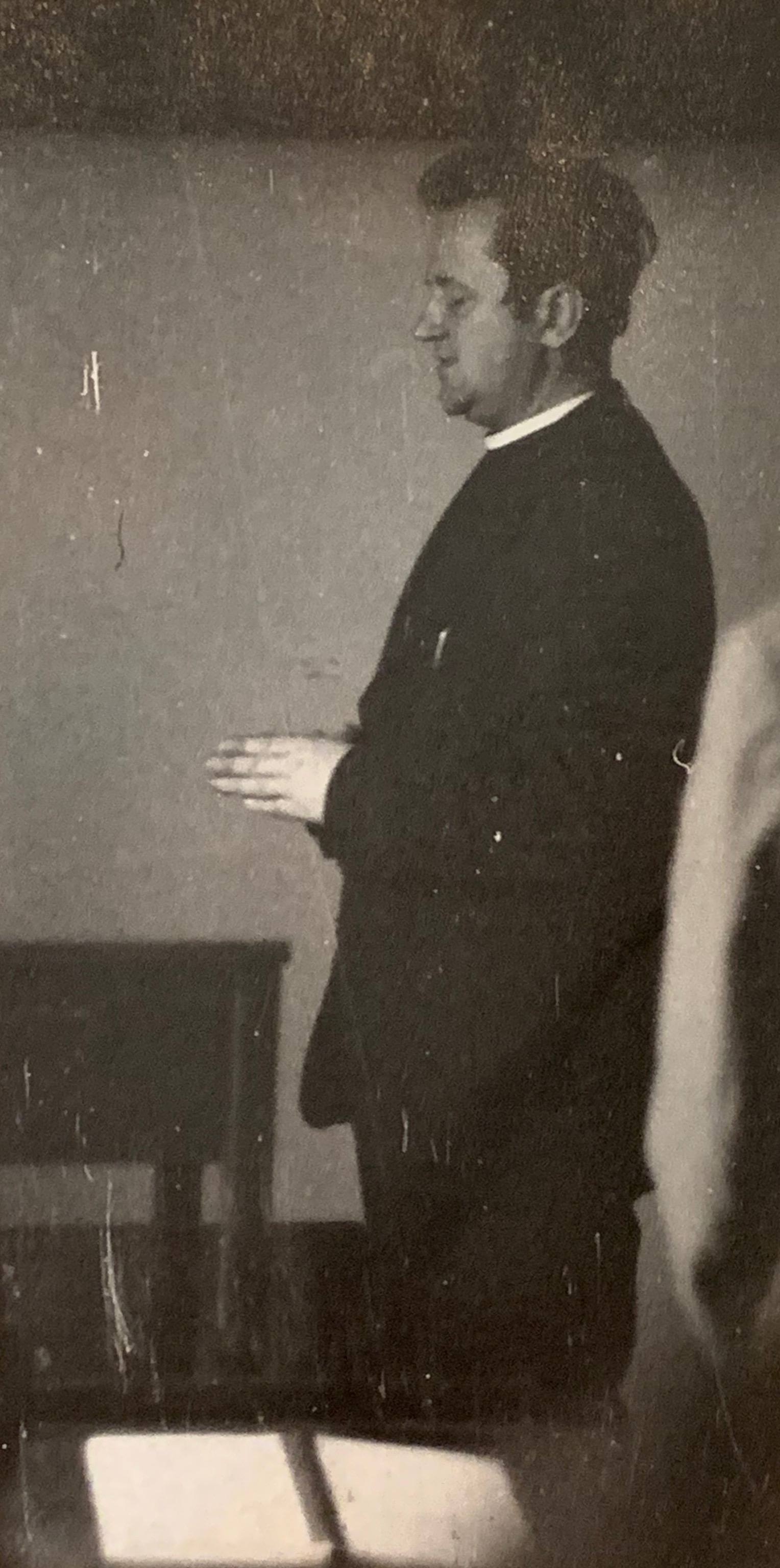 Vyučující dogmatické teologie R.D. Václav Wolf v roce 1976 při modlitbě na začátku přednášky na CMBF v Litoměřicích.